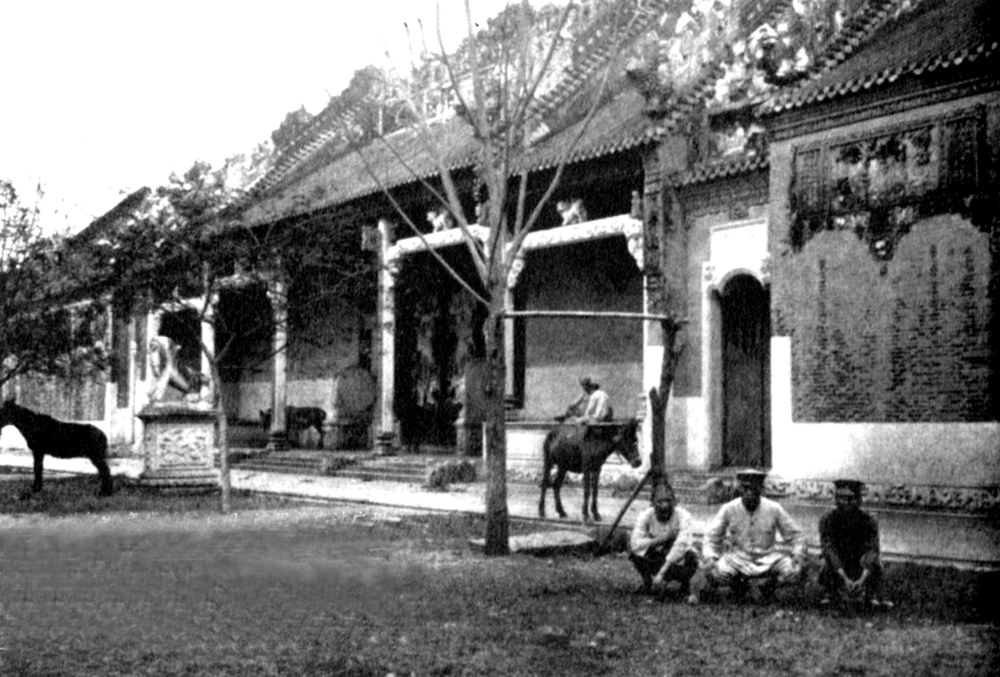 1930年代的廣州市陳家祠